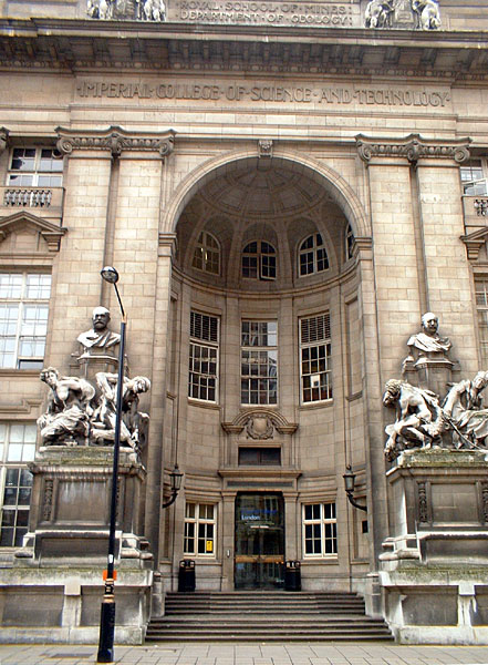 帝国学院地球科学系正门，原皇家矿业学院正门 Taken by A. Brady 27th March 2004